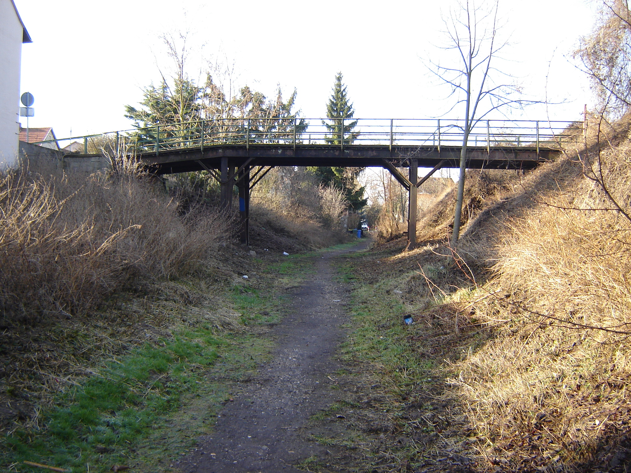 Die Brücke führt einen Wirtschaftsweg vom Ziegelhüttenweg zur Judenhohl über die ehemalige Trasse Richtung Westhofen.